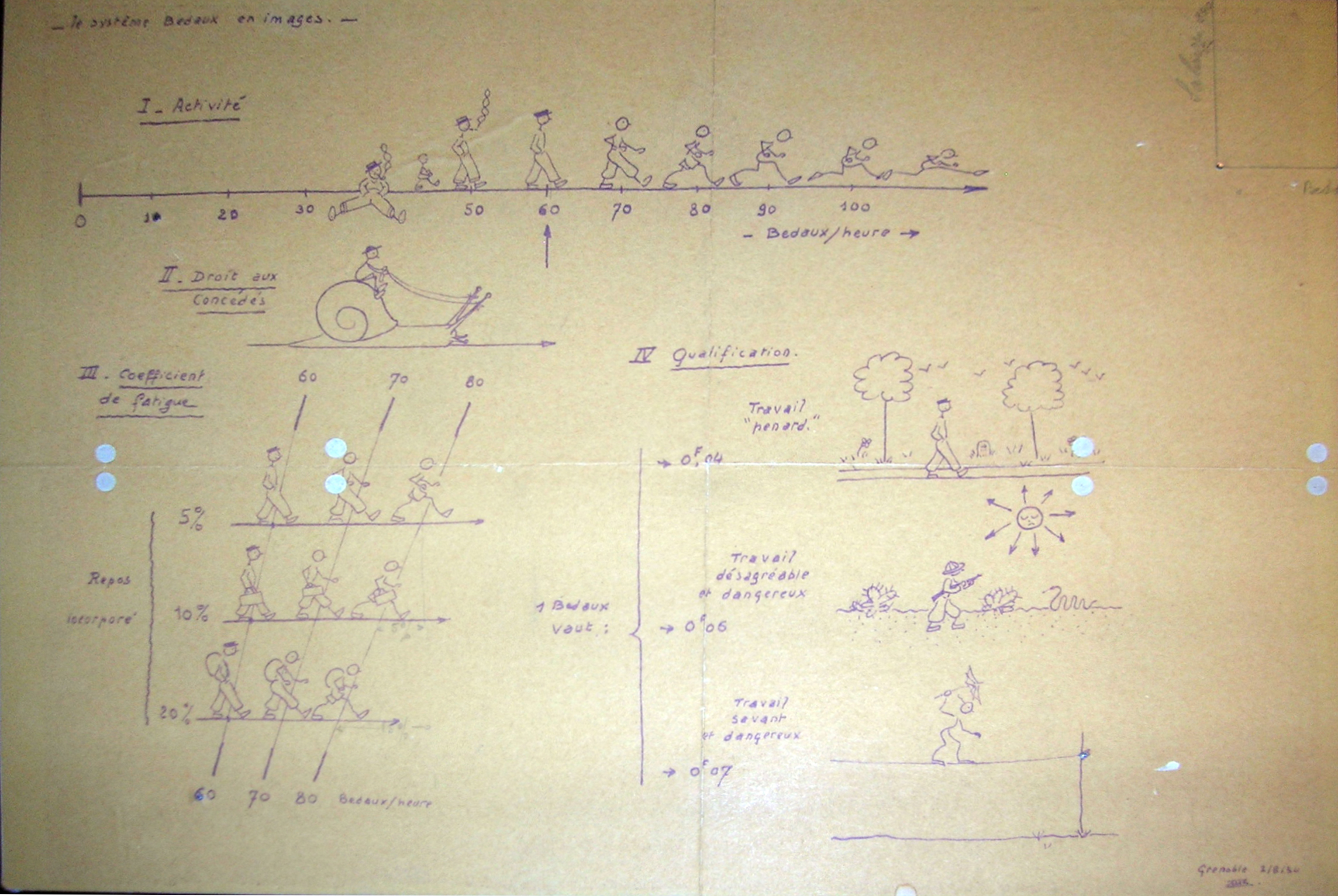 le système Bedaux en images. Papier exposé au Musée de la viscose, Échirolles, Isère, France.